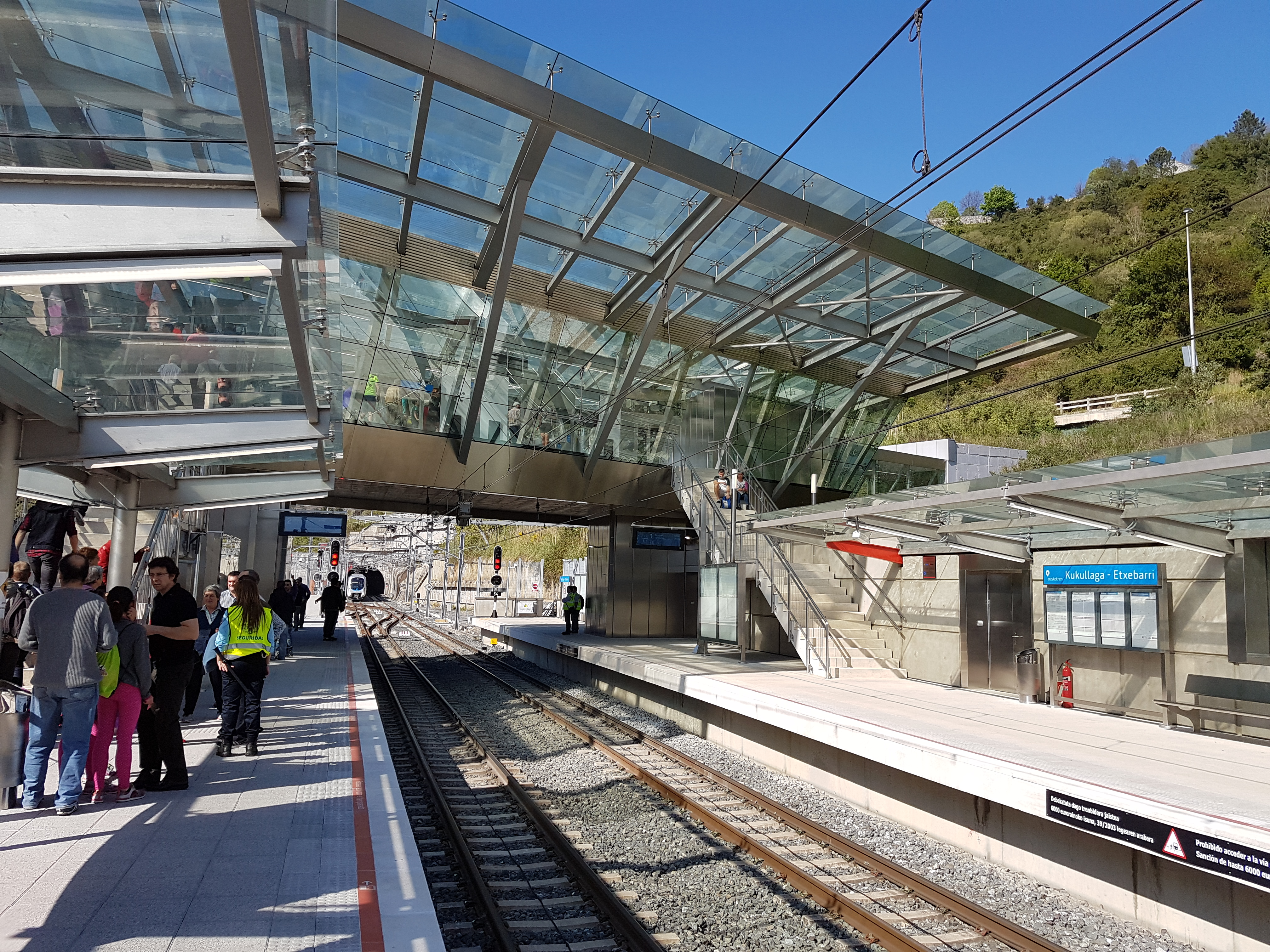 Estación de Kukullaga.